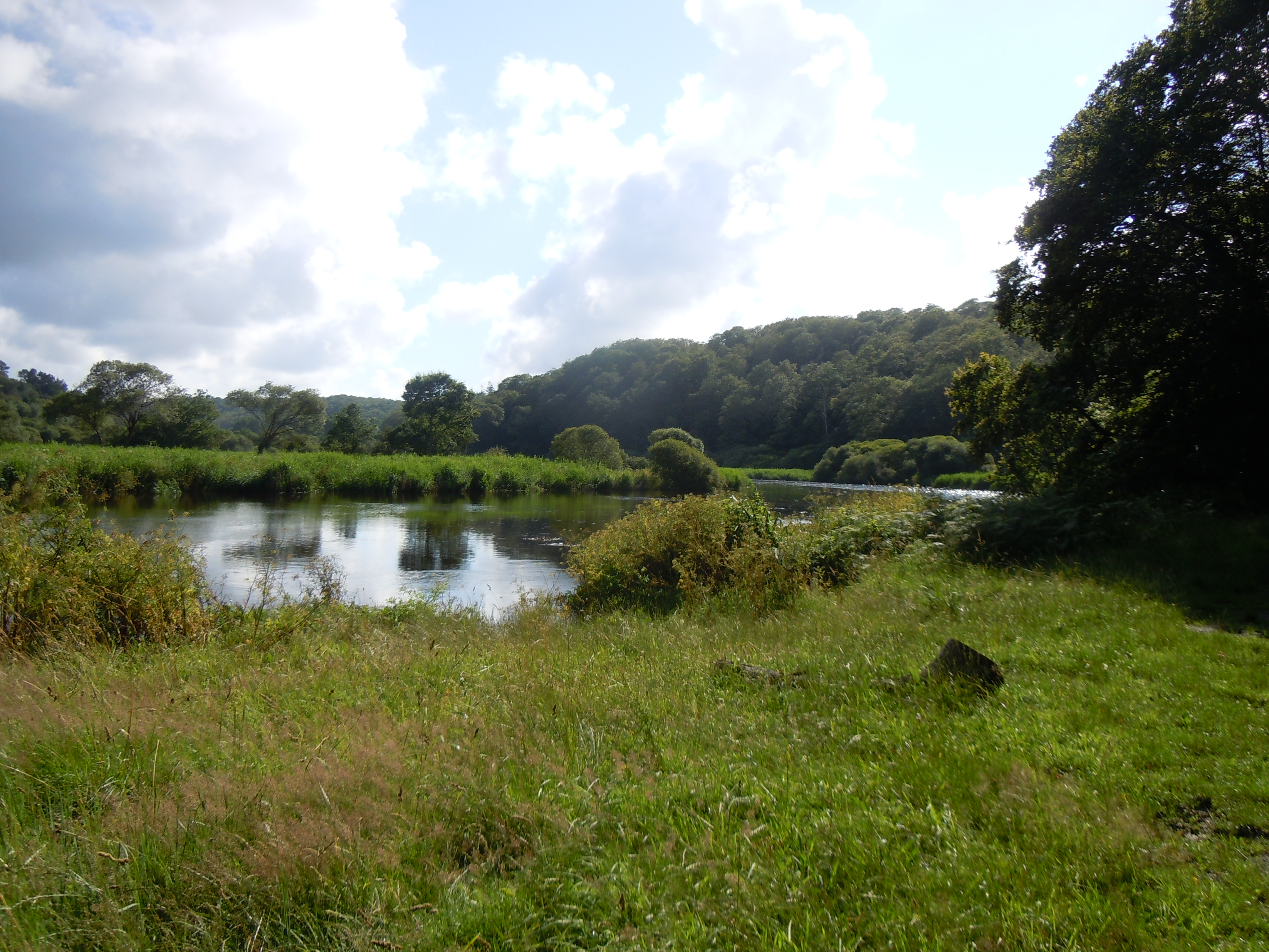 l'ancien port à bois de La Véchène dans la forêt de Carnoët (Quimperlé)